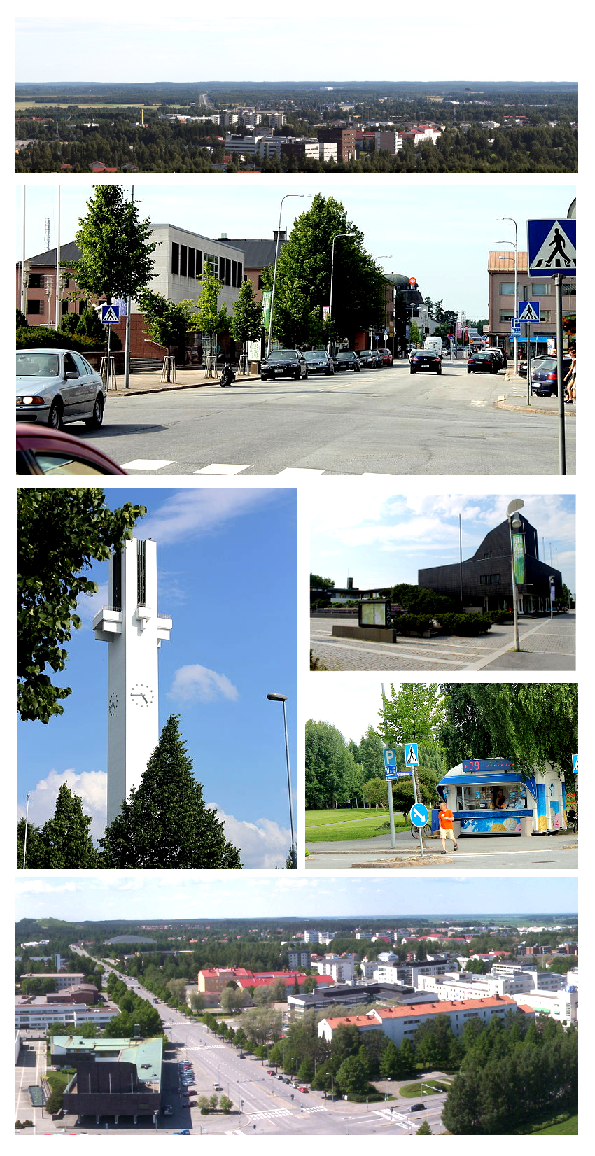 Kuvakollaasi Seinäjoen kaupungista.